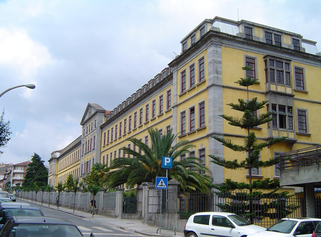 Universidade Catolica.